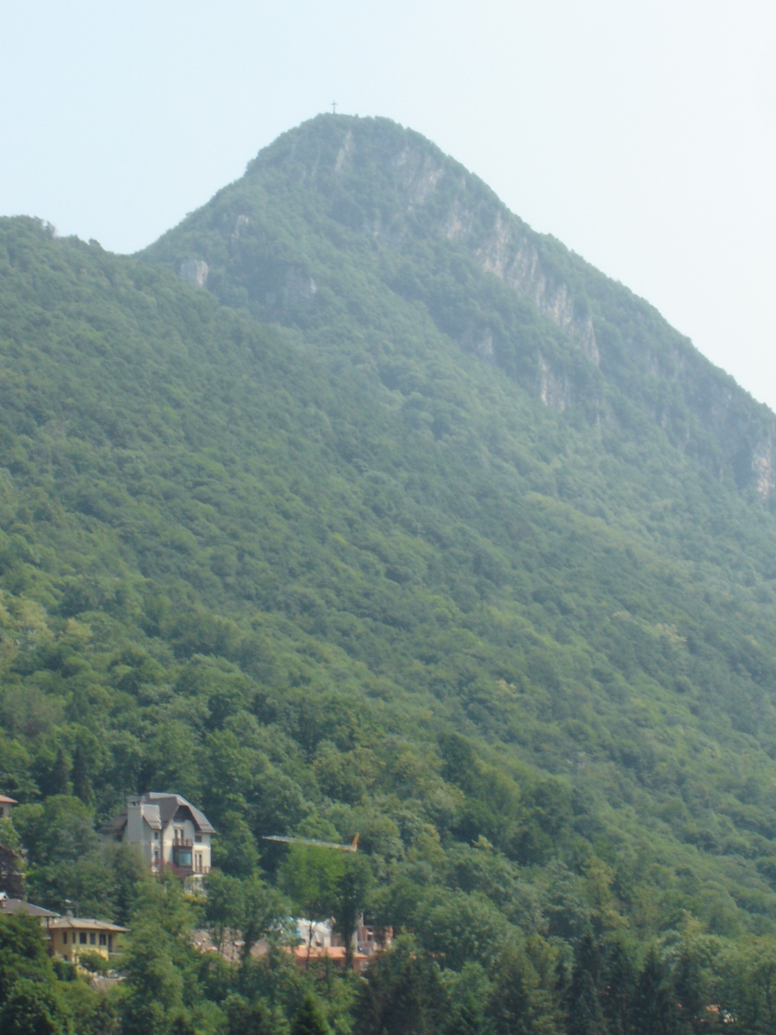 Vista del Monte Poncione da Ganna